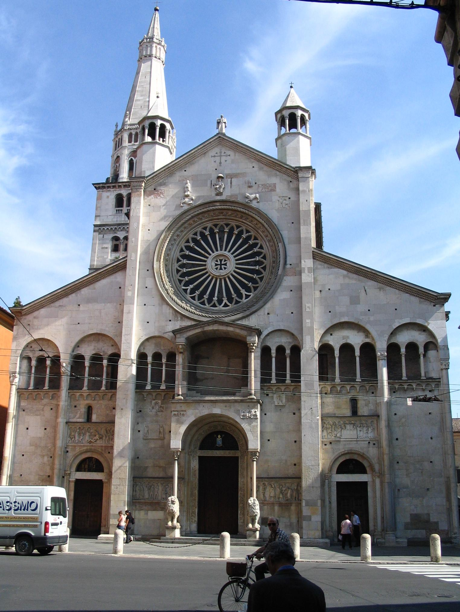 Facciata del Duomo di Modena, romanico, del 1099.